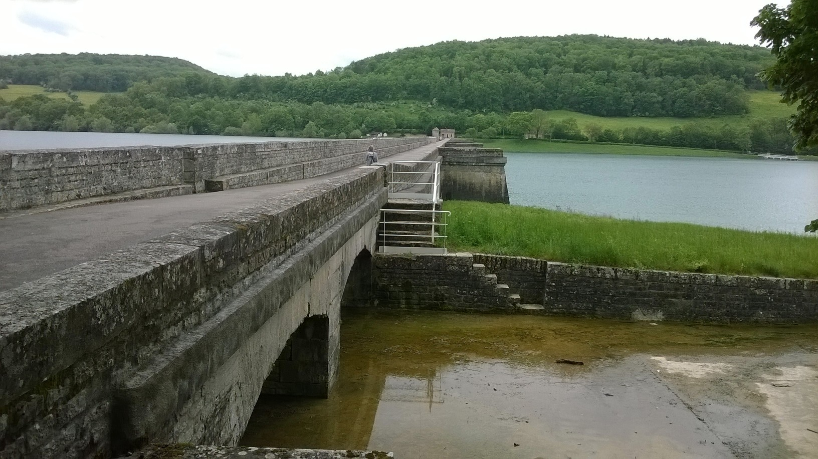 Réservoir de Grosbois - retenue coté amont